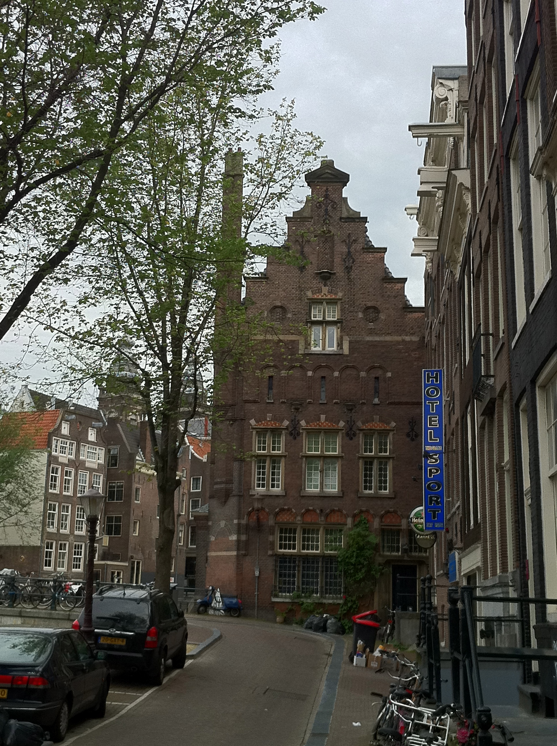 Huize Vredenburgh, Vredenburgersteeg 1 Amsterdam. Panden deels uit de 15e en 16e eeuw, aanbouw uit 1890 van architect A.C. Bleijs